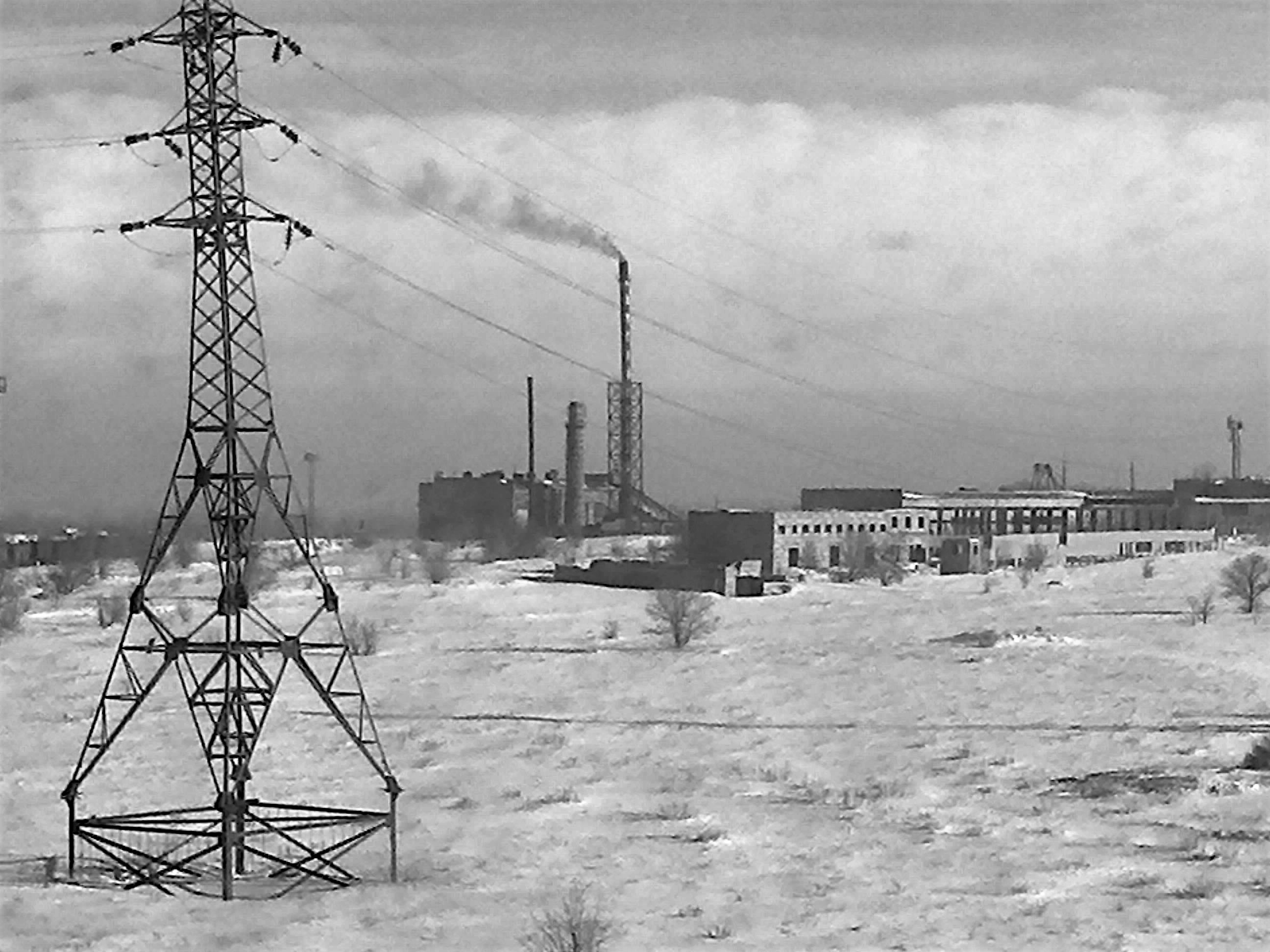 Вид с моста (трасса Караганда-Темиртау) на шахту «Кировская»